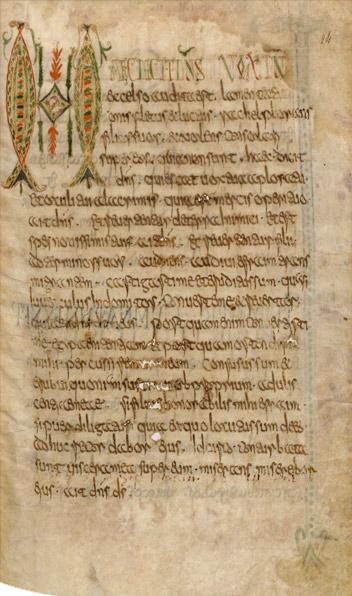 Lectionnaire de Luxeuil folio 24 : Initiale zoomorphe de style mérovingien